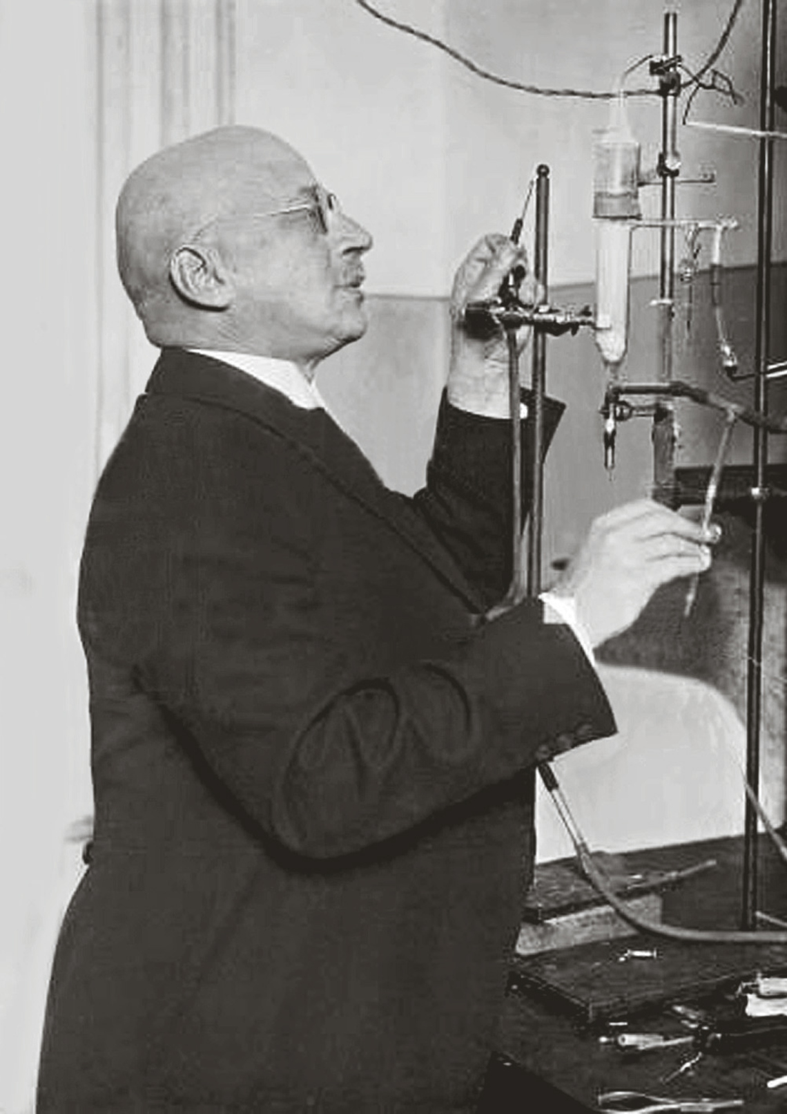 Fritz Haber (* 9. Dezember 1868 in Breslau; † 29. Januar 1934 in Basel), im BASF-Labor